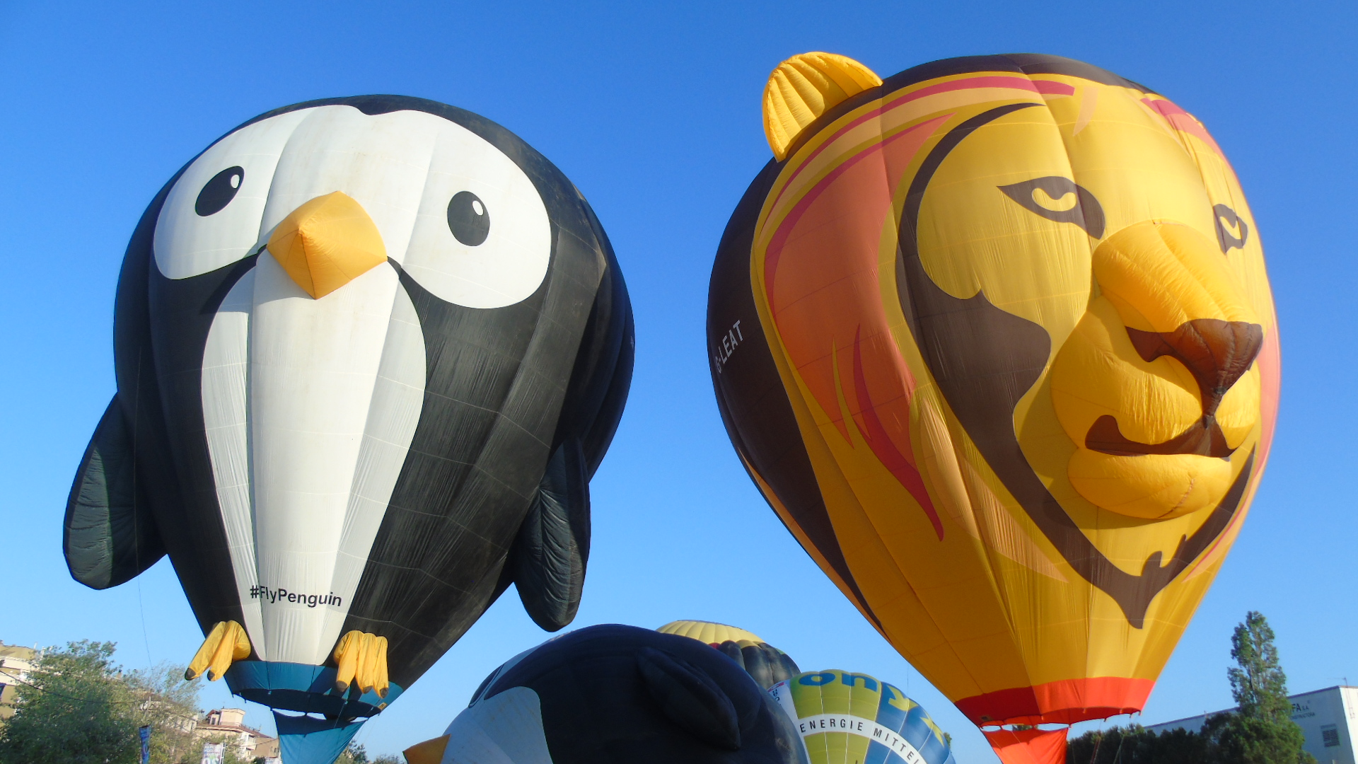 Formes especials: pingüí i lleó. European Balloon Festival any 2016